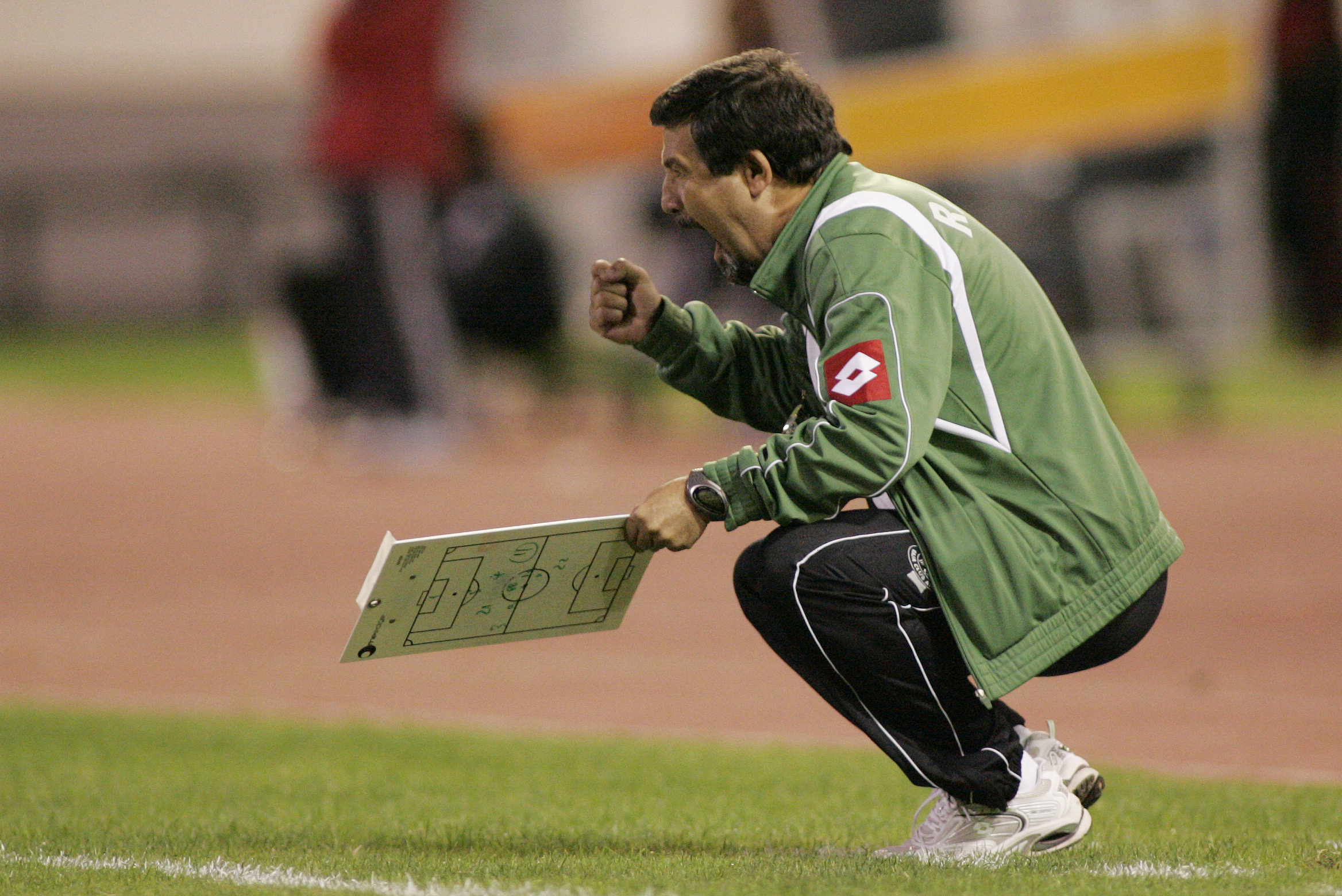 José Romão, entraineur du Raja de Casablanca